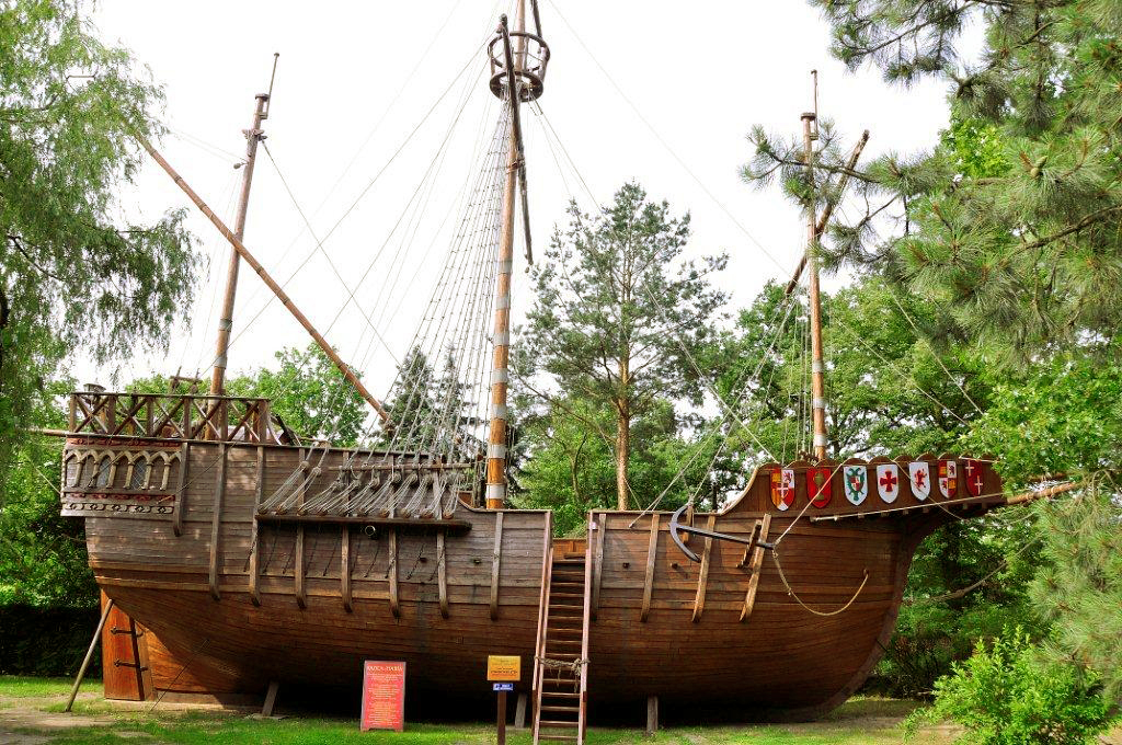 Replika statku (skala 1:1) Krzysztofa Kolumba Santa Marii, która znajduje się w Muzeum Arkadego Fiedlera